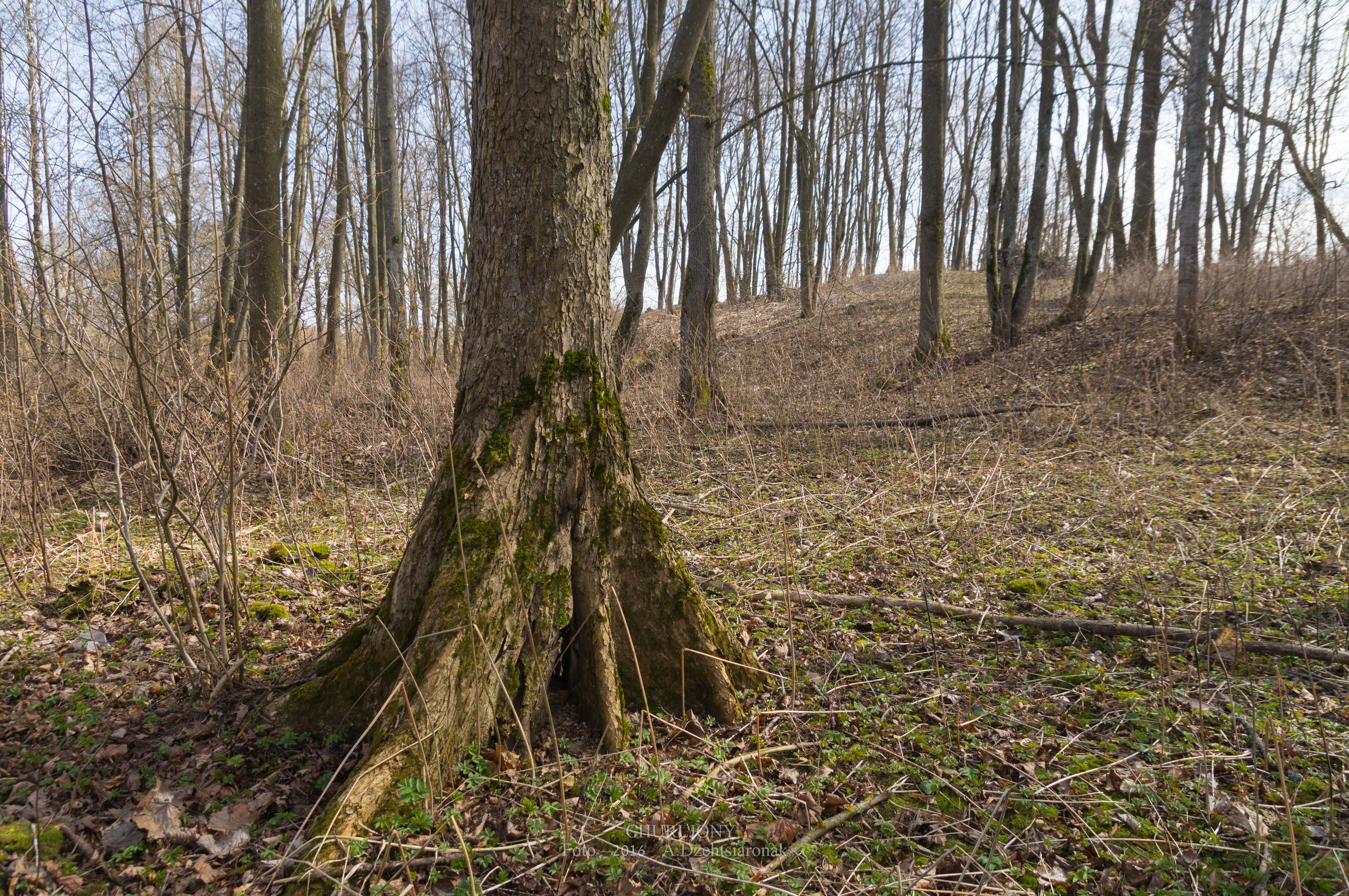 Стары сядзібны парк у Чурлёнах